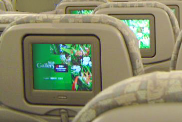 BR 777